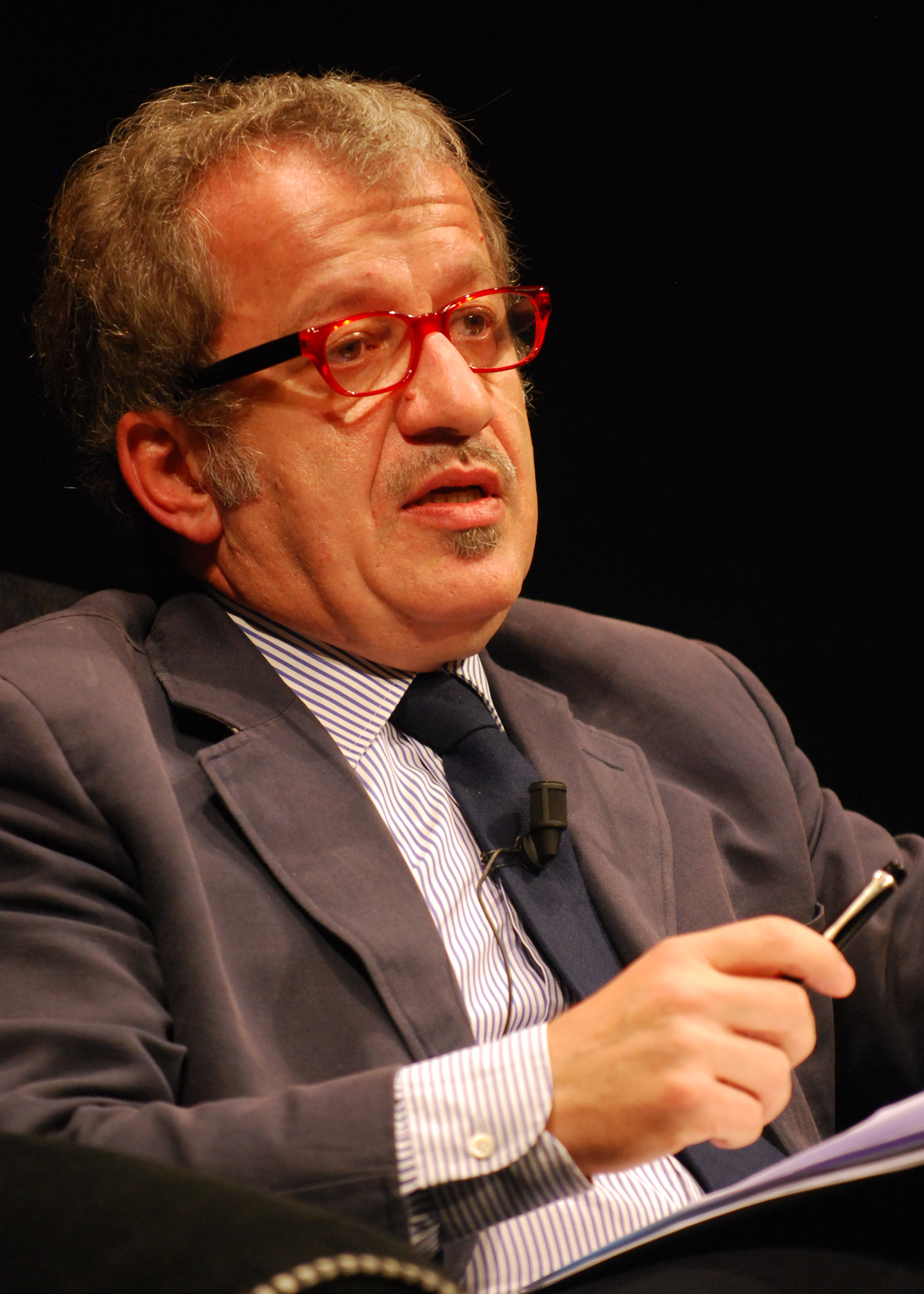 Il Ministro dell'Interno Roberto Maroni al Teatro Sociale di Trento per il Festival dell'Economia.